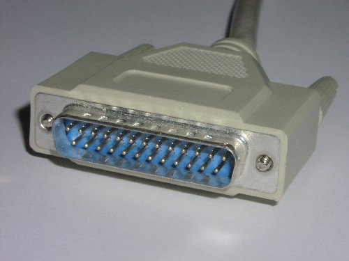 (c) 2004 Wim van 't Einde Vaassen.